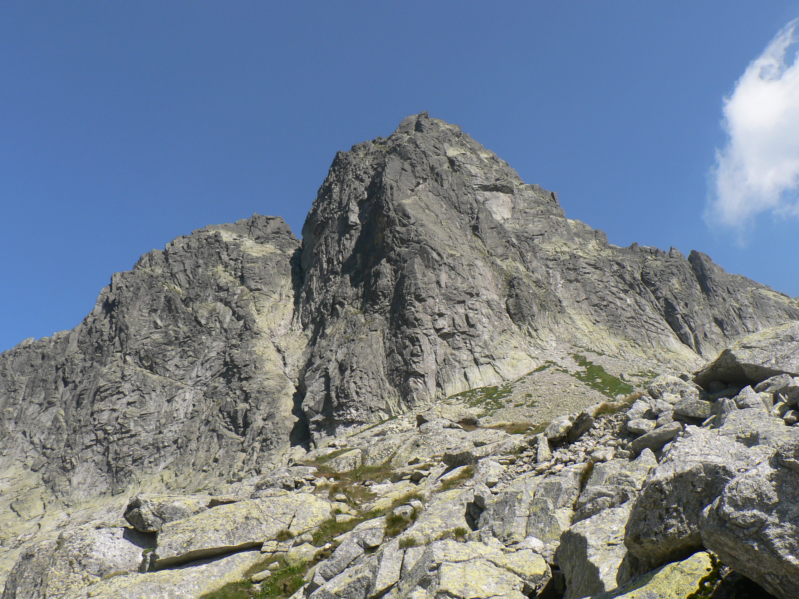 Ostry Szczyt ze szlaku z Czerwonej Ławki